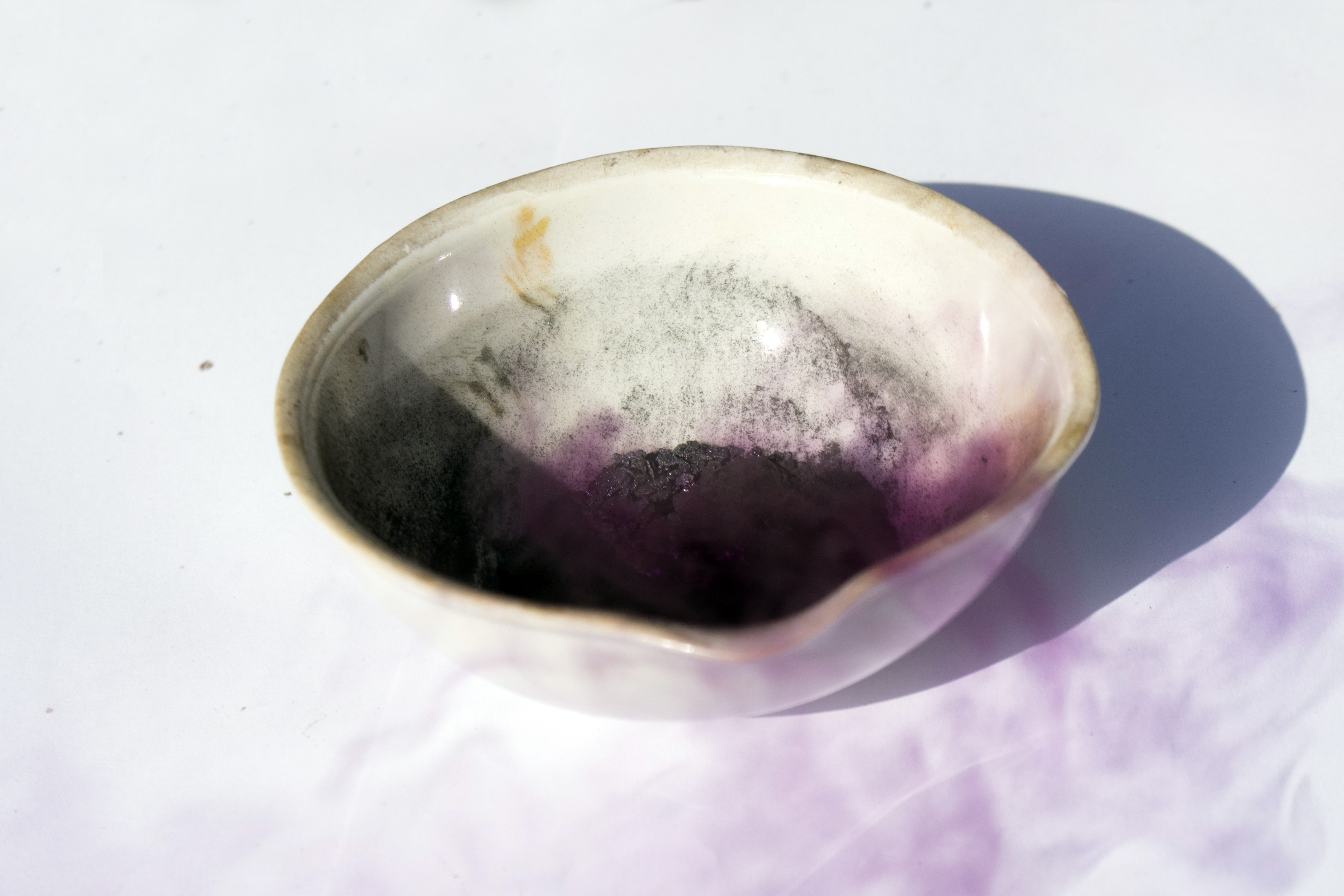 Synteza jodku magnezu z pierwiastków pod wpływem wody.